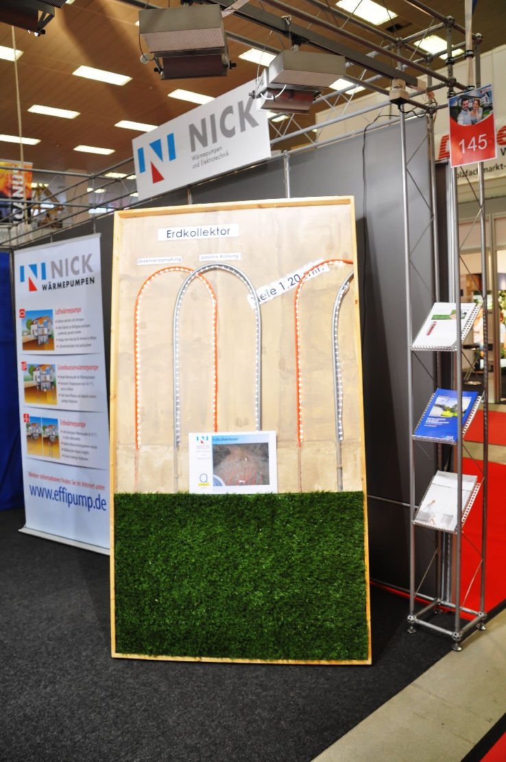 Haus & Energie 2015 in Sindelfingen.